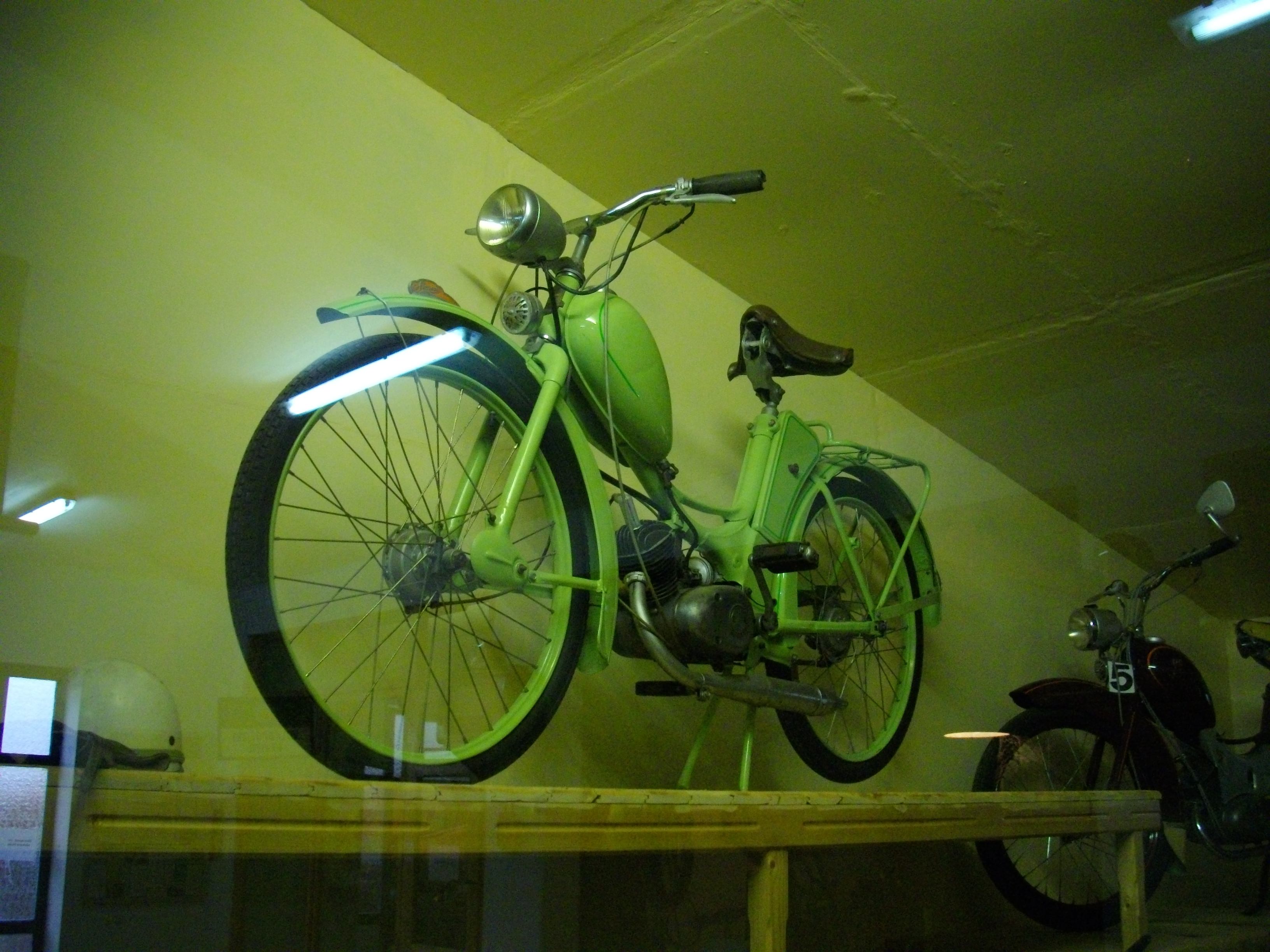 Simson-Moped SR 1.